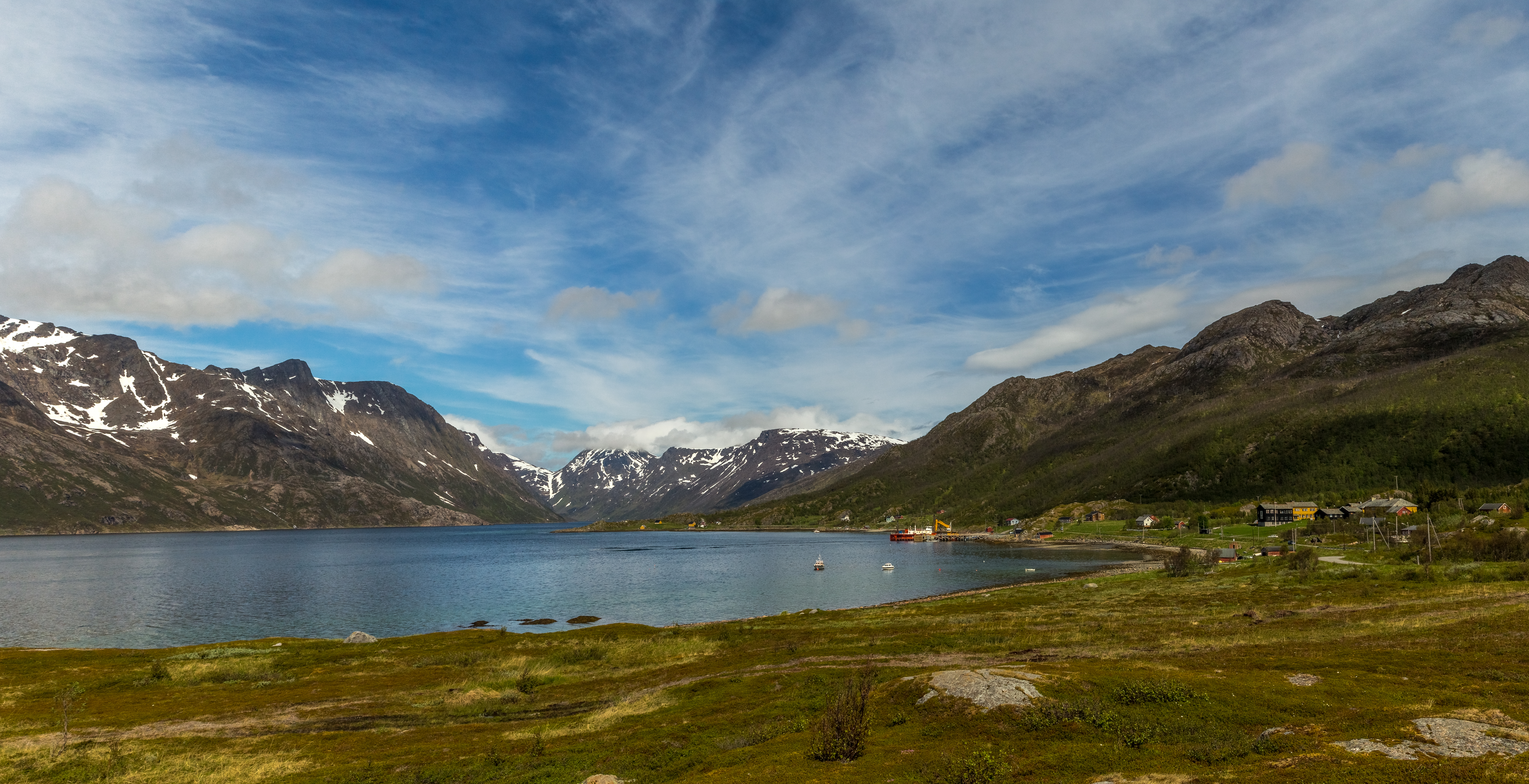 Kufjord